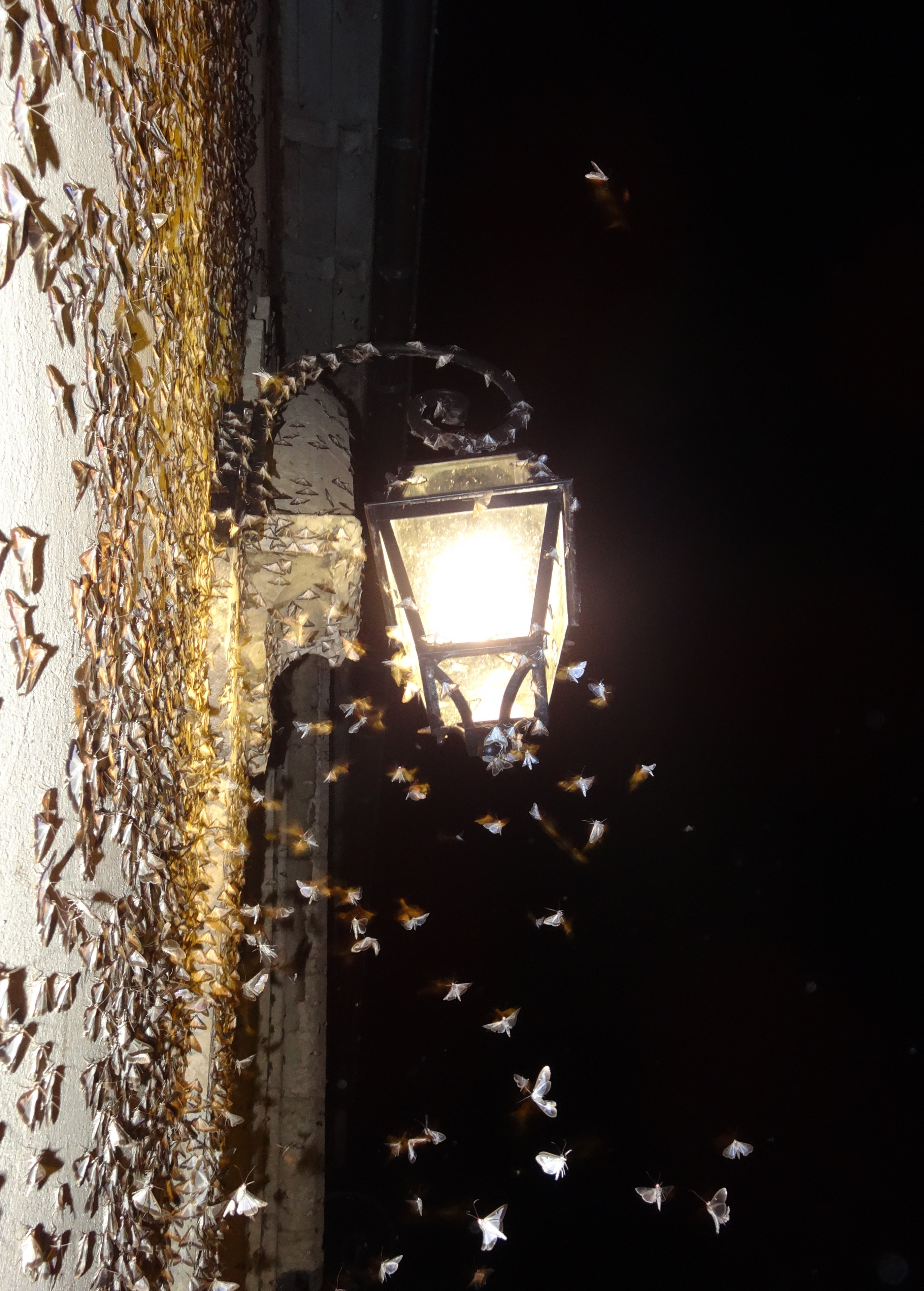 Invasion de pyrale du buis (Cydalima perspectalis). Saint-Rambert-en-Bugey, 2016